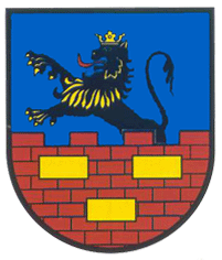 herb turki 1928